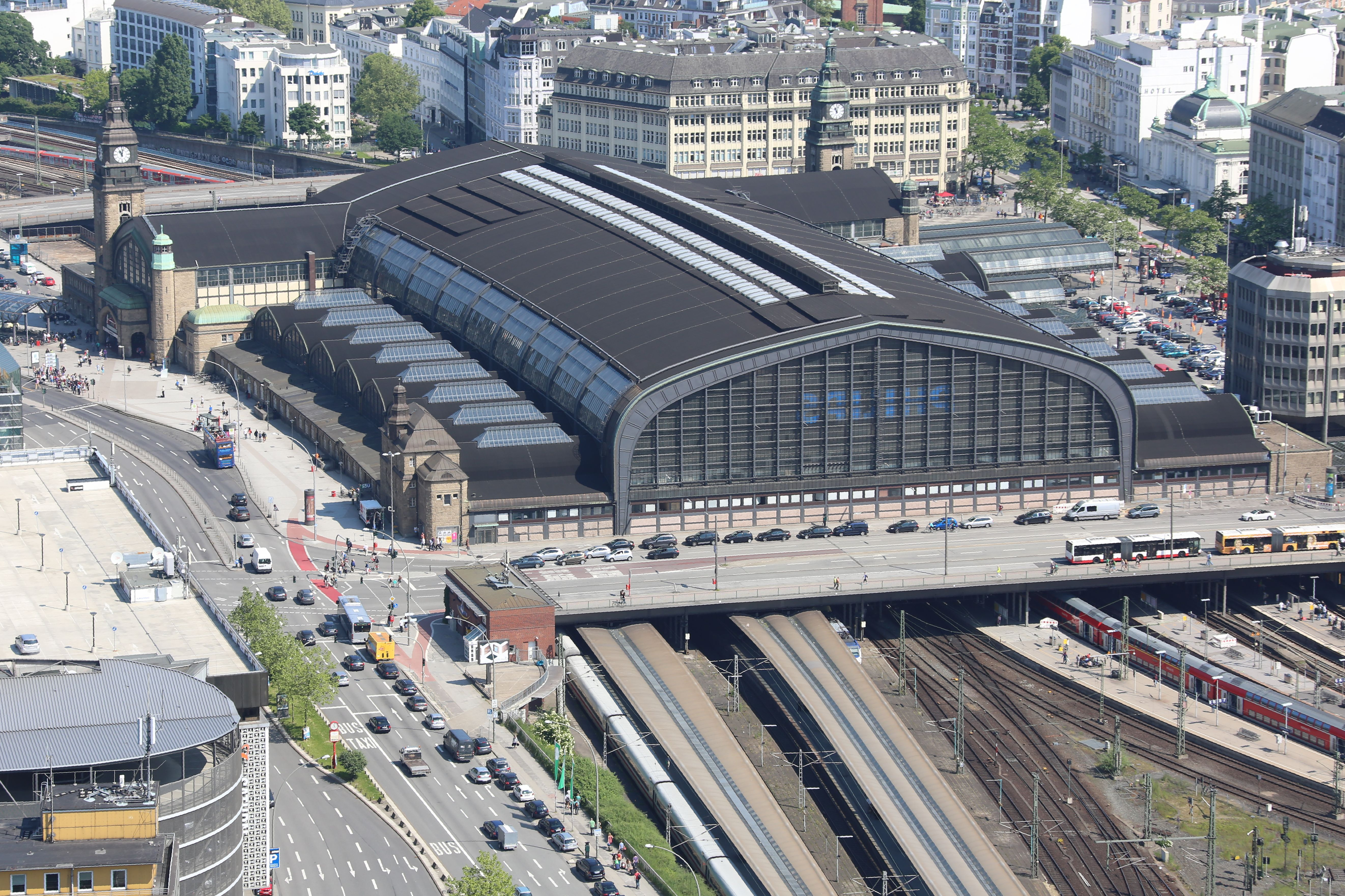 Projekt Heißluftballon, Fahrt über Hamburg und Umgebung. This photo was taken by Alchemist-hp. If you use one of my photos, an email (account needed) or a message or direct to: my email account would be greatly appreciated. Please note the license terms. Other licensing terms can get discussed, too. This file has been released under a license which is incompatible with Facebook's licensing terms. It is not permitted to upload this file to Facebook.